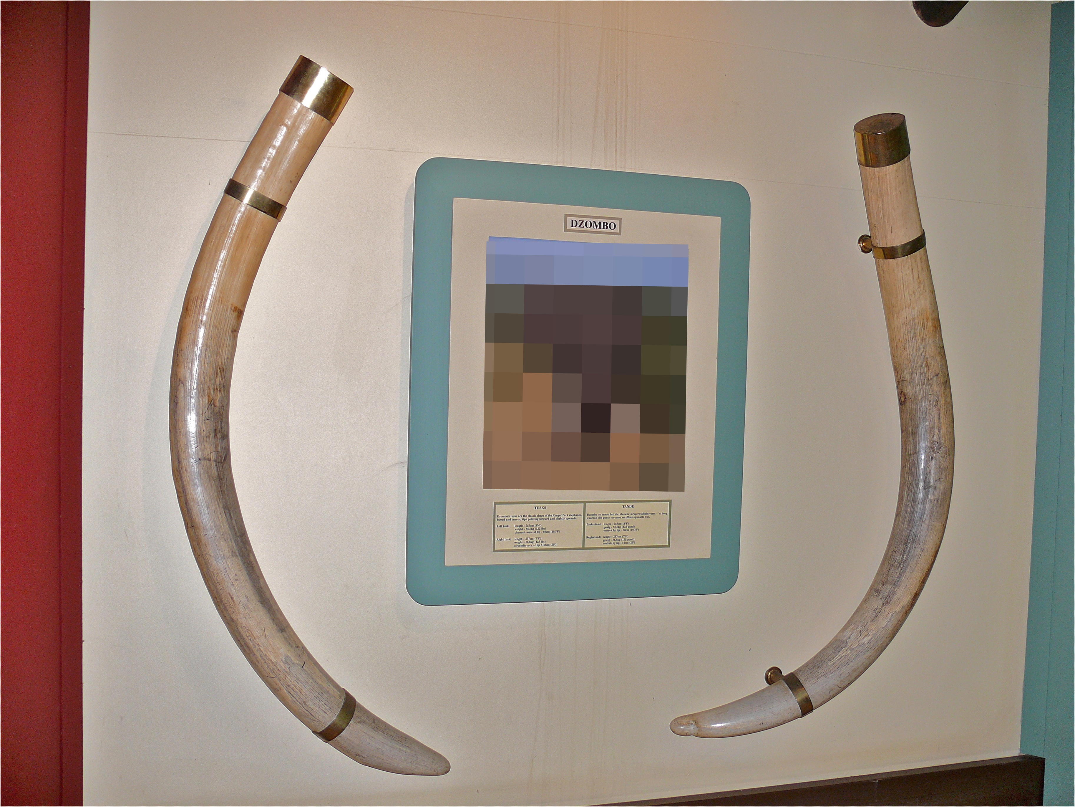 Letaba Camp, Kruger NP, SOUTH AFRICA